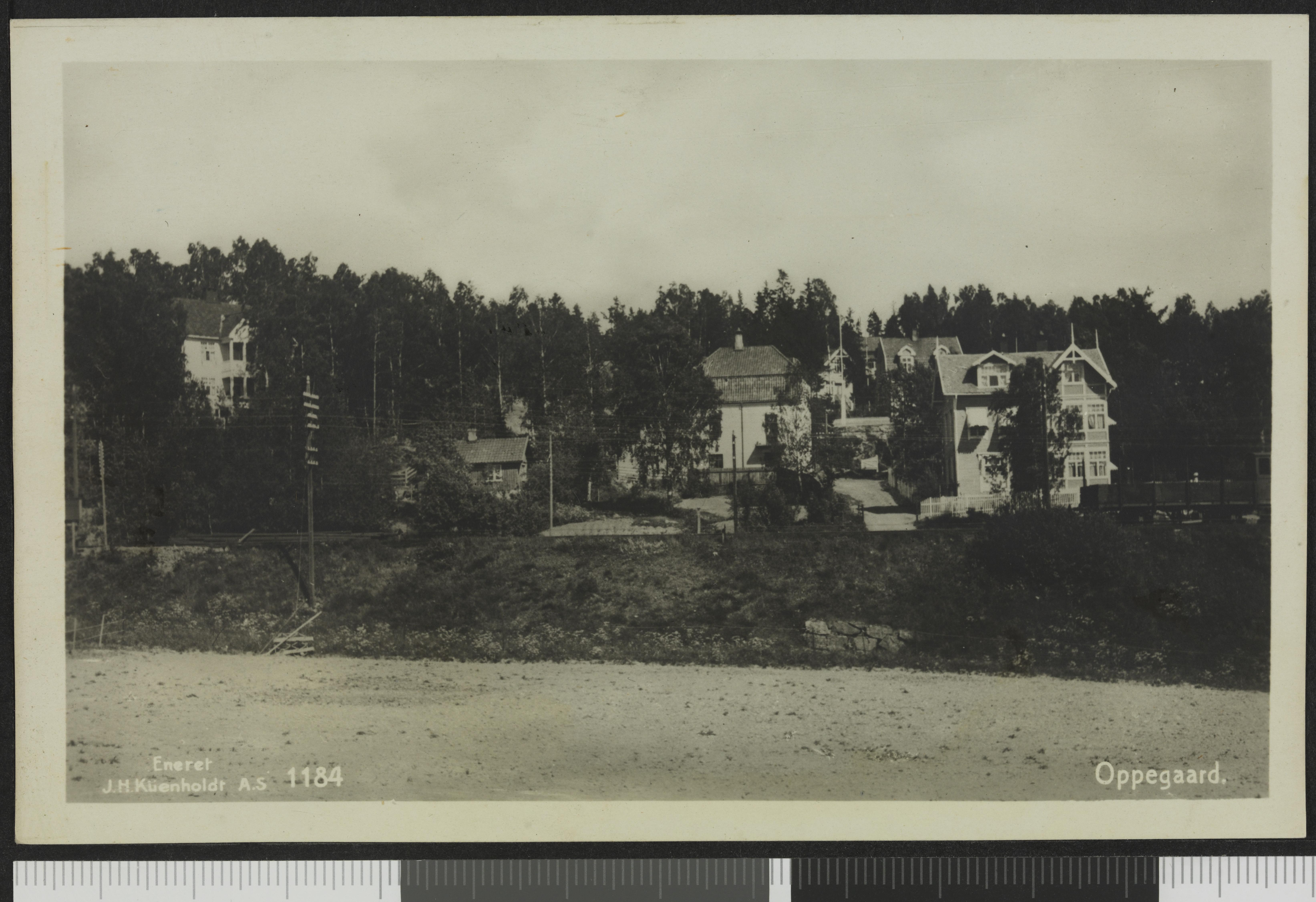 Bildet er hentet fra Nasjonalbibliotekets bildesamling Kolbotn, Oppegård, Akershus